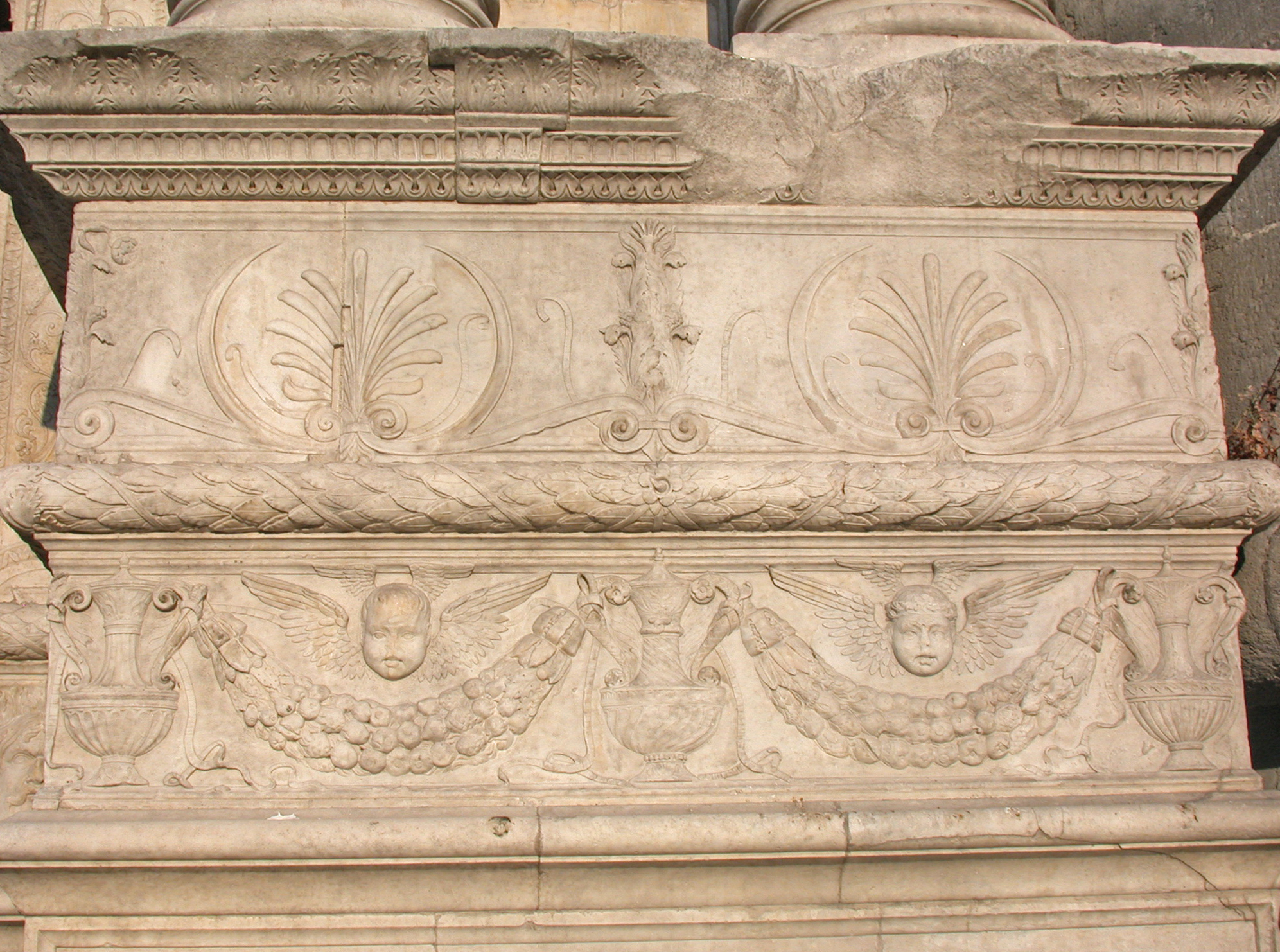 Italia, Campania, Napoli, Castel Nuovo (Maschio Angioino), arco trionfale di ingresso, passaggio, basamenti della decorazione interna